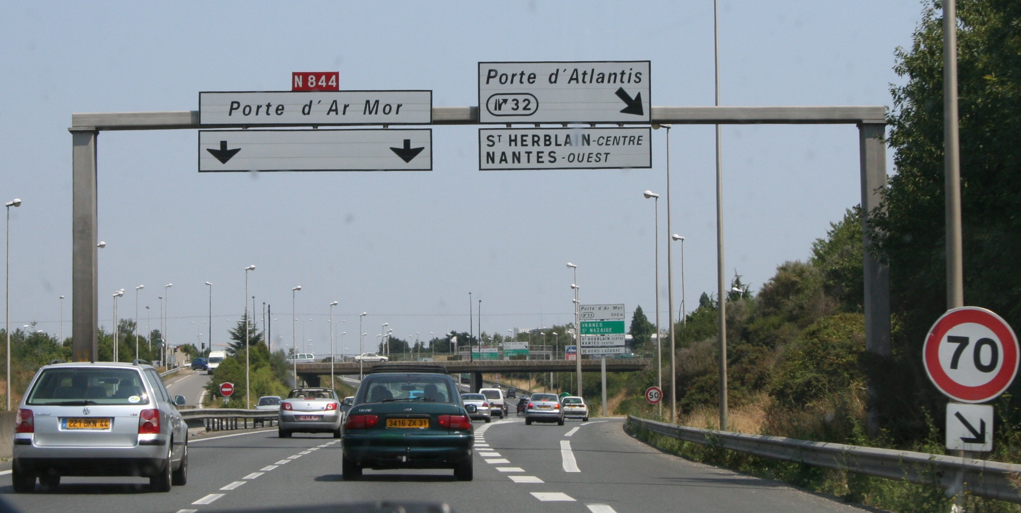 Photo du périphérique de Nantes au niveau de la Porte d'Atlantis à Saint-Herblain, sens sud-nord